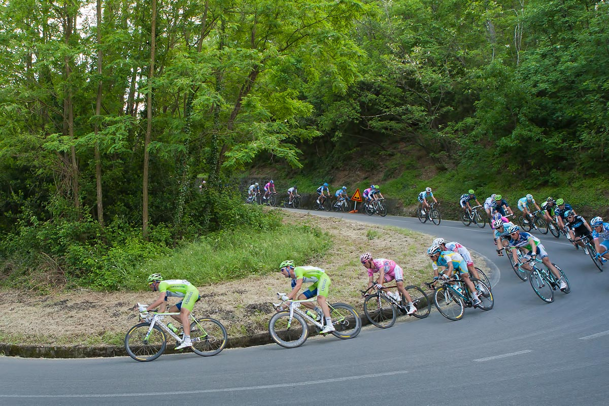 Assisi-Montecatini terme presso la discesa di Vico a 15Km dall'arrivo, in testa alla corsa c'era un corridore della Katusha e in seconda posizione G.Visconti seguito dal gruppo a 5".